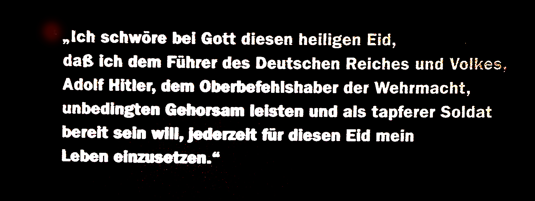 Soldateneid der Reichswehreid (März/Mai 1935 in Wehrmacht umbenannt) ab 20. August 1934: „Ich schwöre bei Gott diesen heiligen Eid, dass ich dem Führer des Deutschen Reiches und Volkes, Adolf Hitler, dem Oberbefehlshaber der Wehrmacht, unbedingten Gehorsam leisten und als tapferer Soldat bereit sein will, jederzeit für diesen Eid mein Leben einzusetzen.“